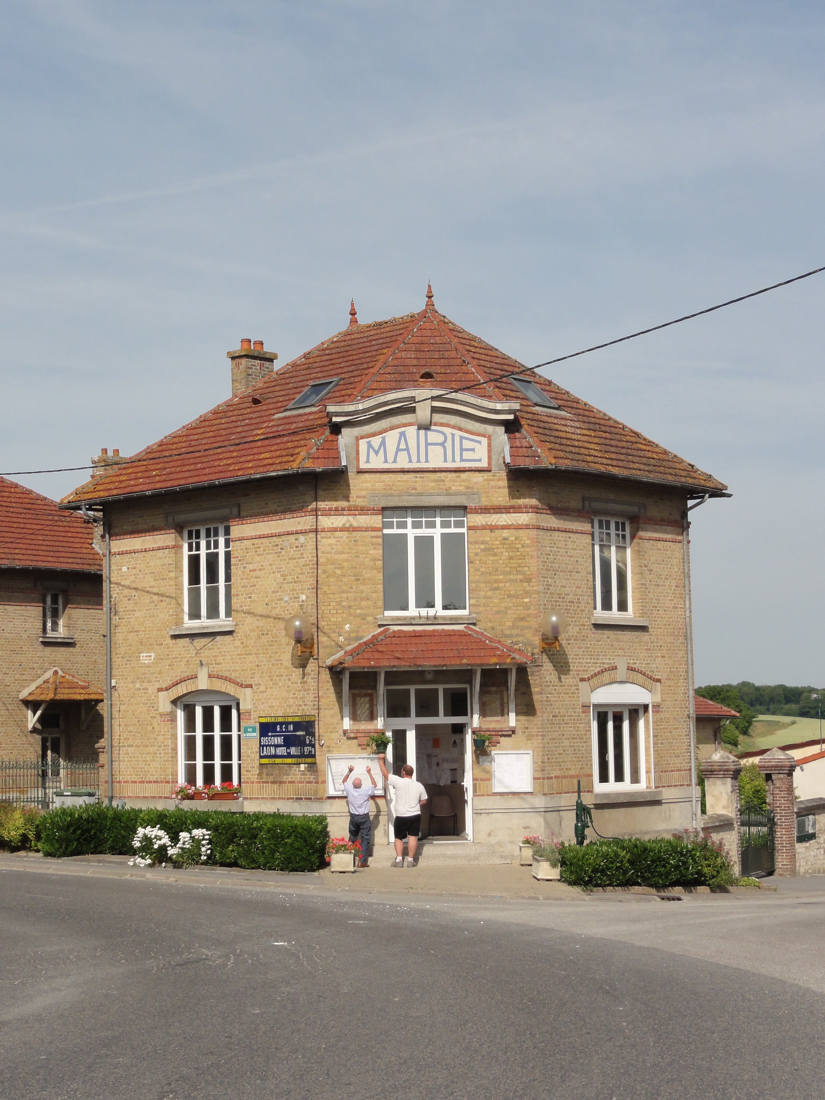 Lappion (Aisne) mairie